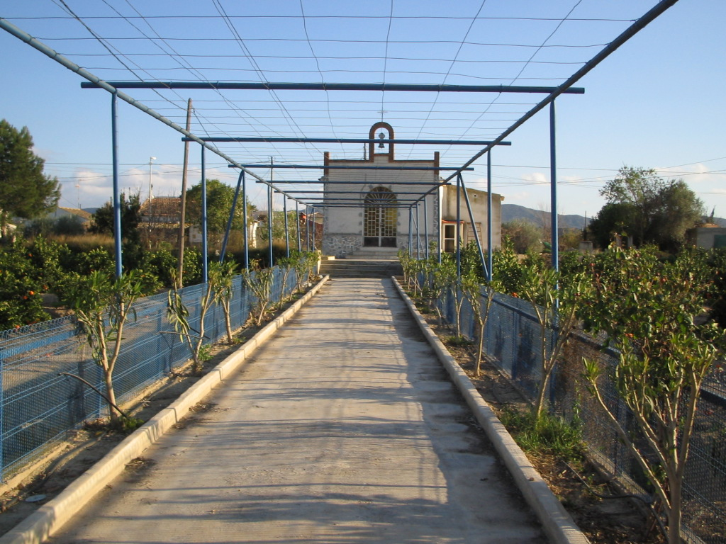 Ermita de La Habana, en Desamparados, Orihuela